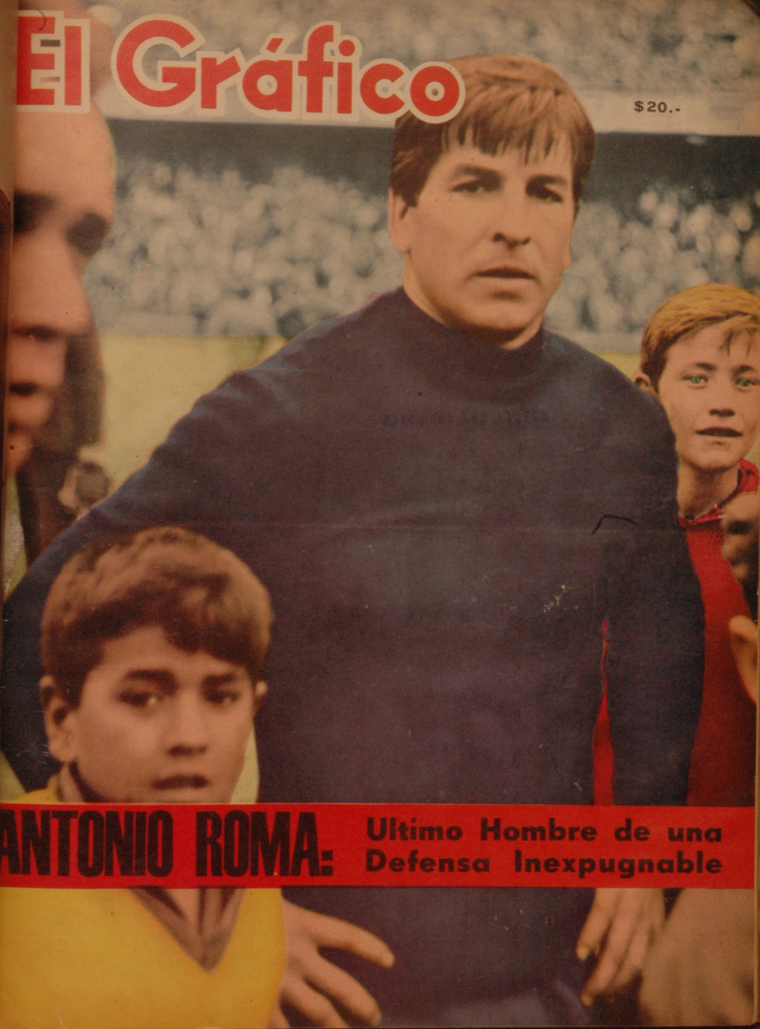 El Grafico del 23 de Septiembre de 1964. Edicion 2346